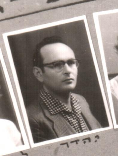 יוסף הדר היה מלחין ישראלי. הלחין עשרות שירים, בהם בולטים במיוחד הם שירי הרועים, שרווחו בשנות החמישים.